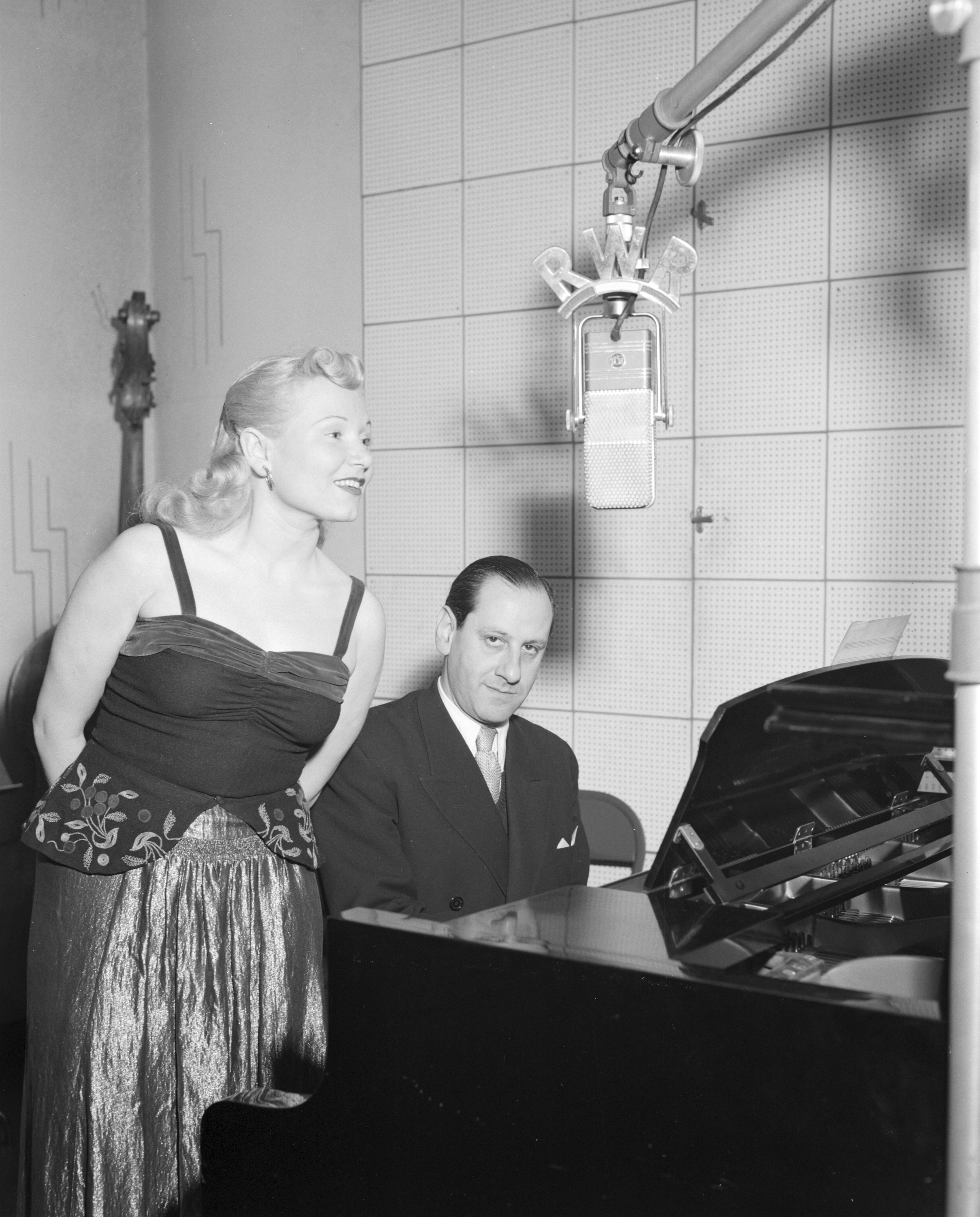 Cissy Kraner und Hugo Wiener im Studio des Senders Rot-Weiß-Rot bei einer Aufnahme der Kabarettsendung Aktualitätlichkeiten.